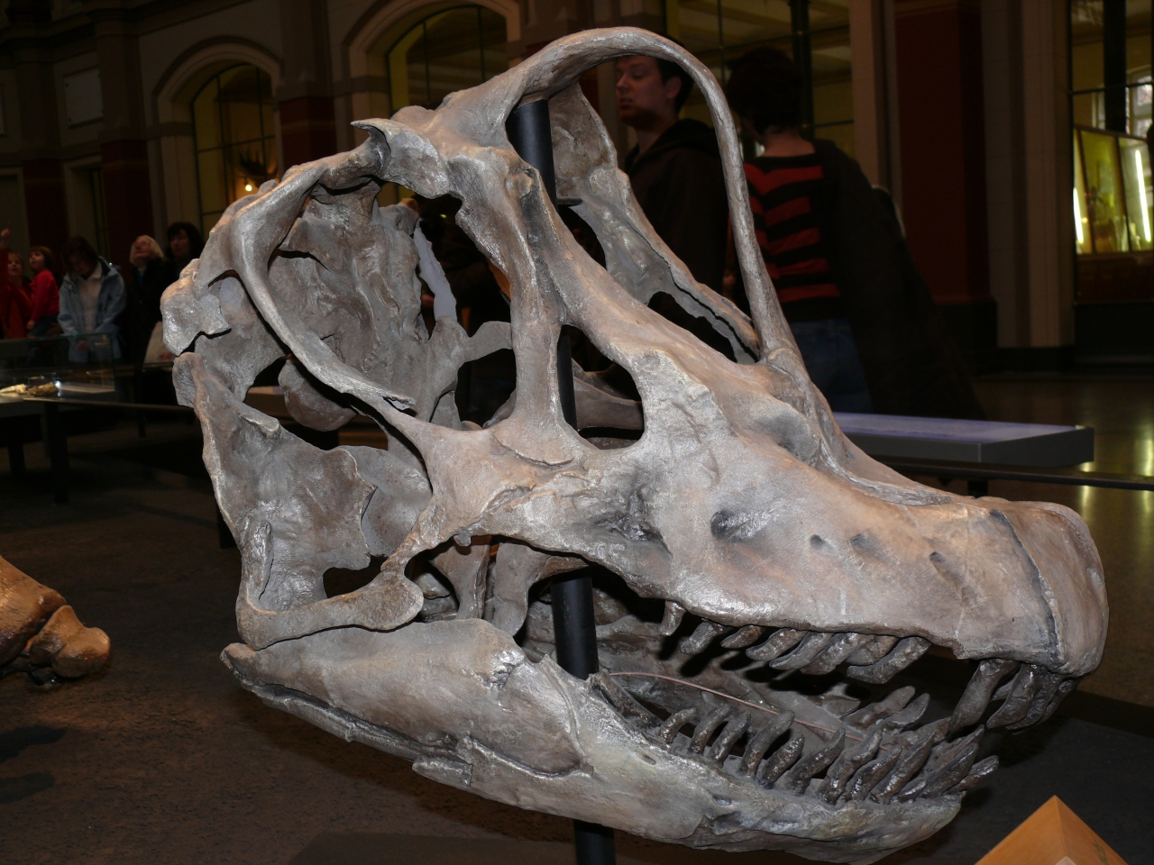 Skull of Brachiosaurus brancai HMN SII, Naturkundemuseum Berlin